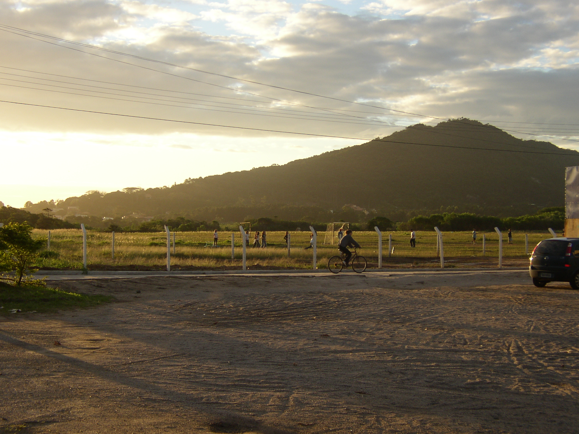 Ehemaliger Flugplatz von Campeche (Florianópolis)